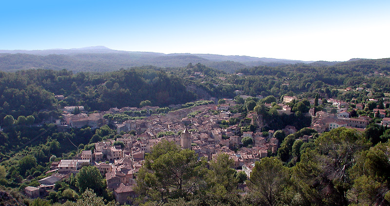 barjols vue de la croix 800 424